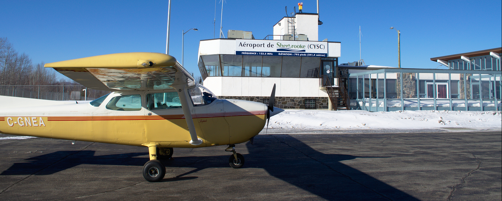 Cessna 172 à Sherbrooke